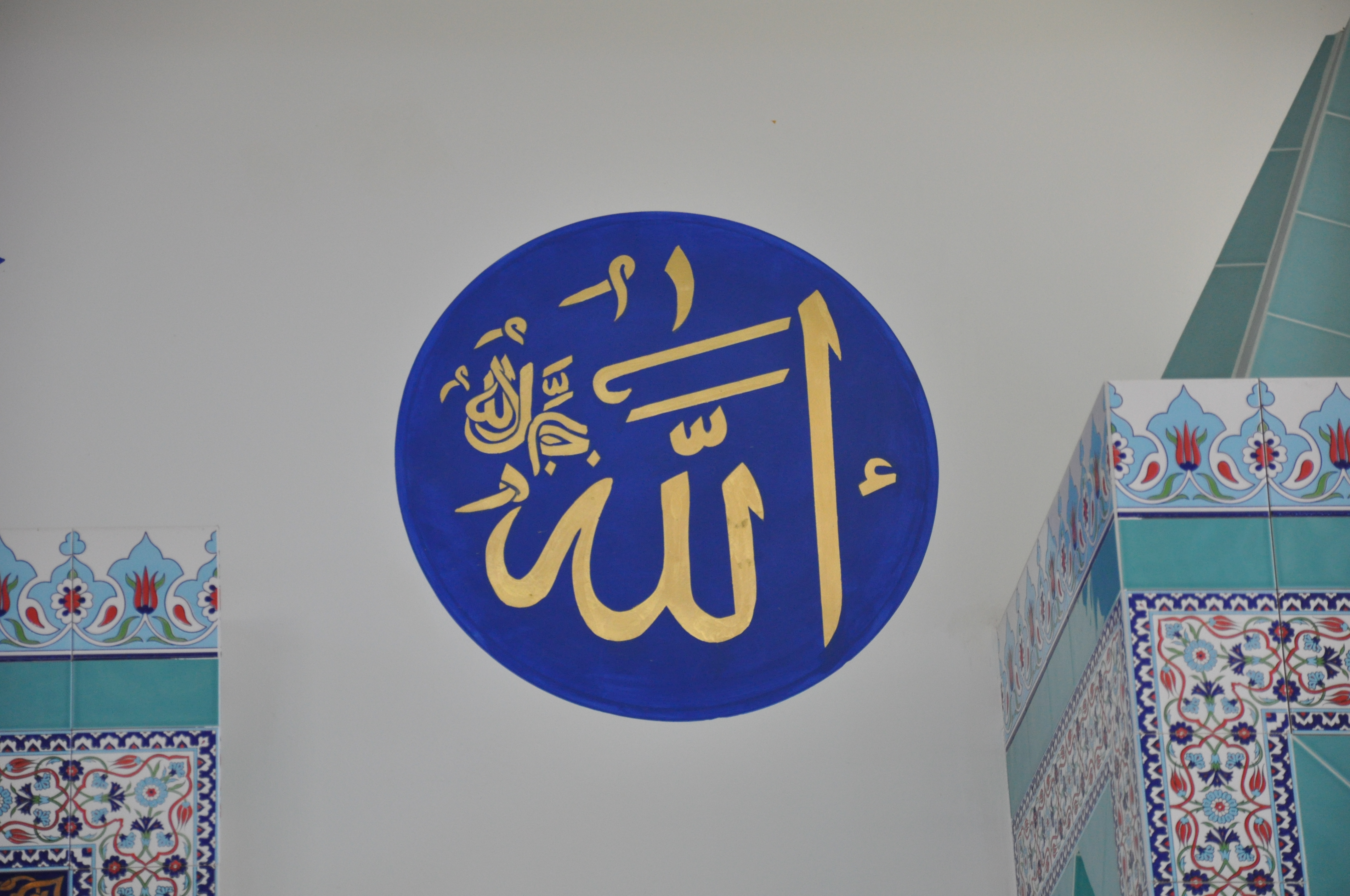 Ravensburg, Mevlana-Moschee (Schützenstraße) – Kalligraphie Allah